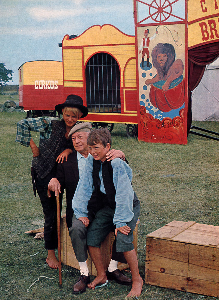 Bombi Bitt och jag. Swedish TV Drama series. from left: Stellan Skarsgård, Fritiof Nilsson Piraten and Reiner Albrecht.